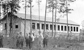 Vuonna 1954 Pudasjärven Hirvakosken kylään valmistunut koulurakennus. Kuvassa urakoitsija Antti Kauppila miehineen.